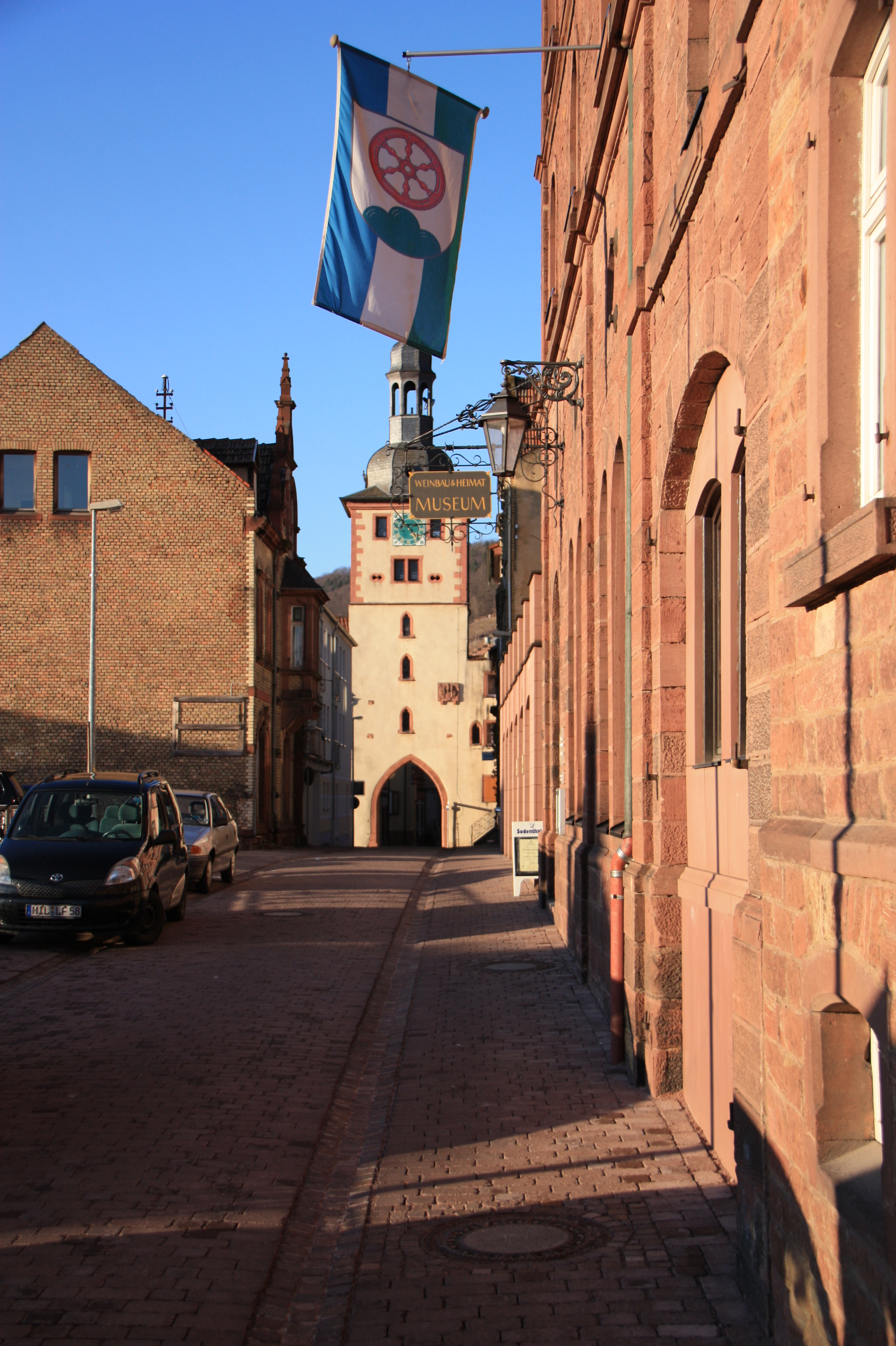 Der Brunntorturm in Klingenberg, rechts im Bild das städtische Weinbau- und Heimatmuseum mit der Klingenberger Flagge